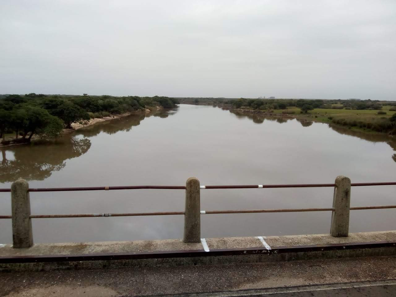 foto desde el puente de la ruta 126